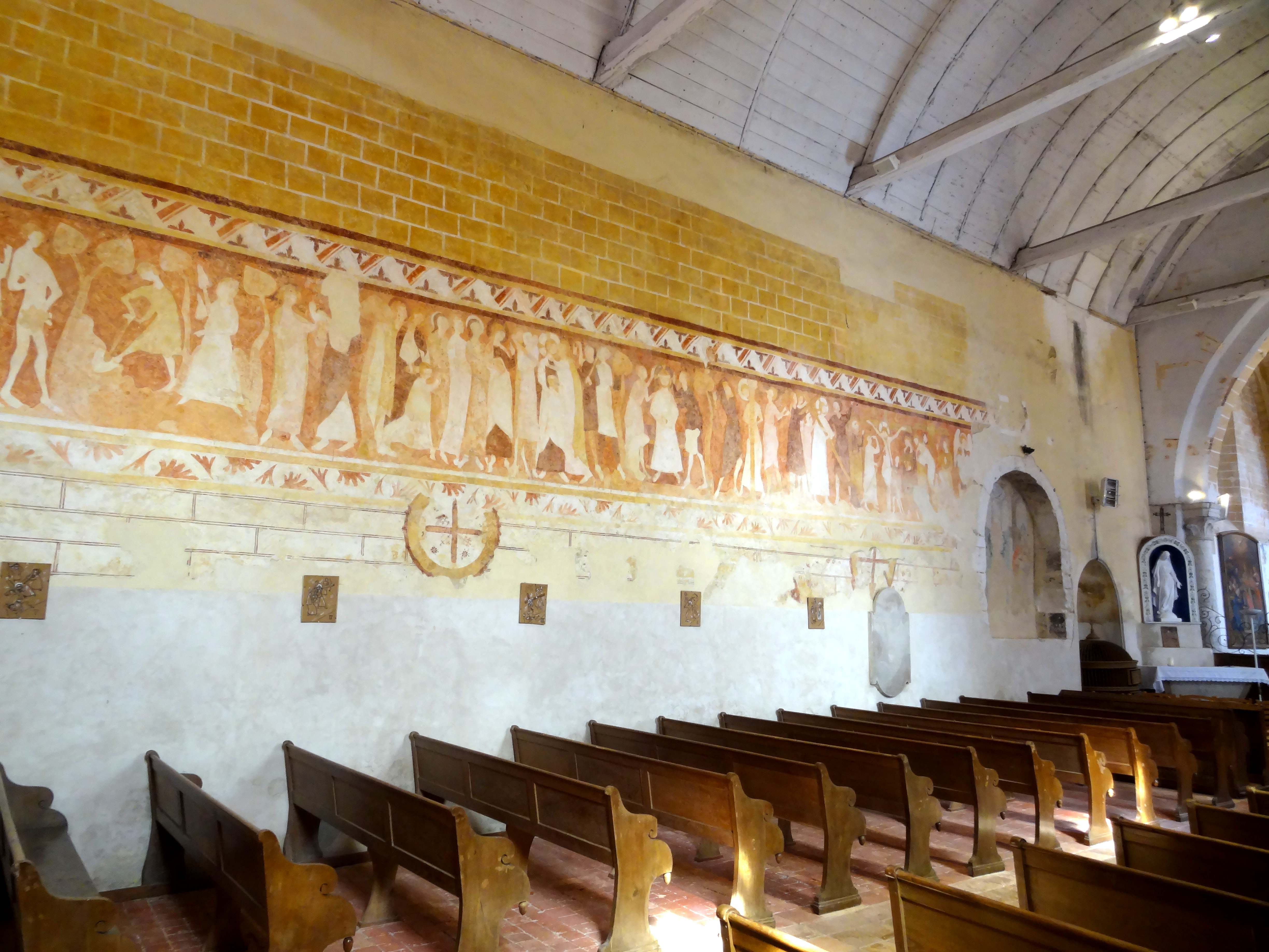 Intérieur de l'église - voir titre.